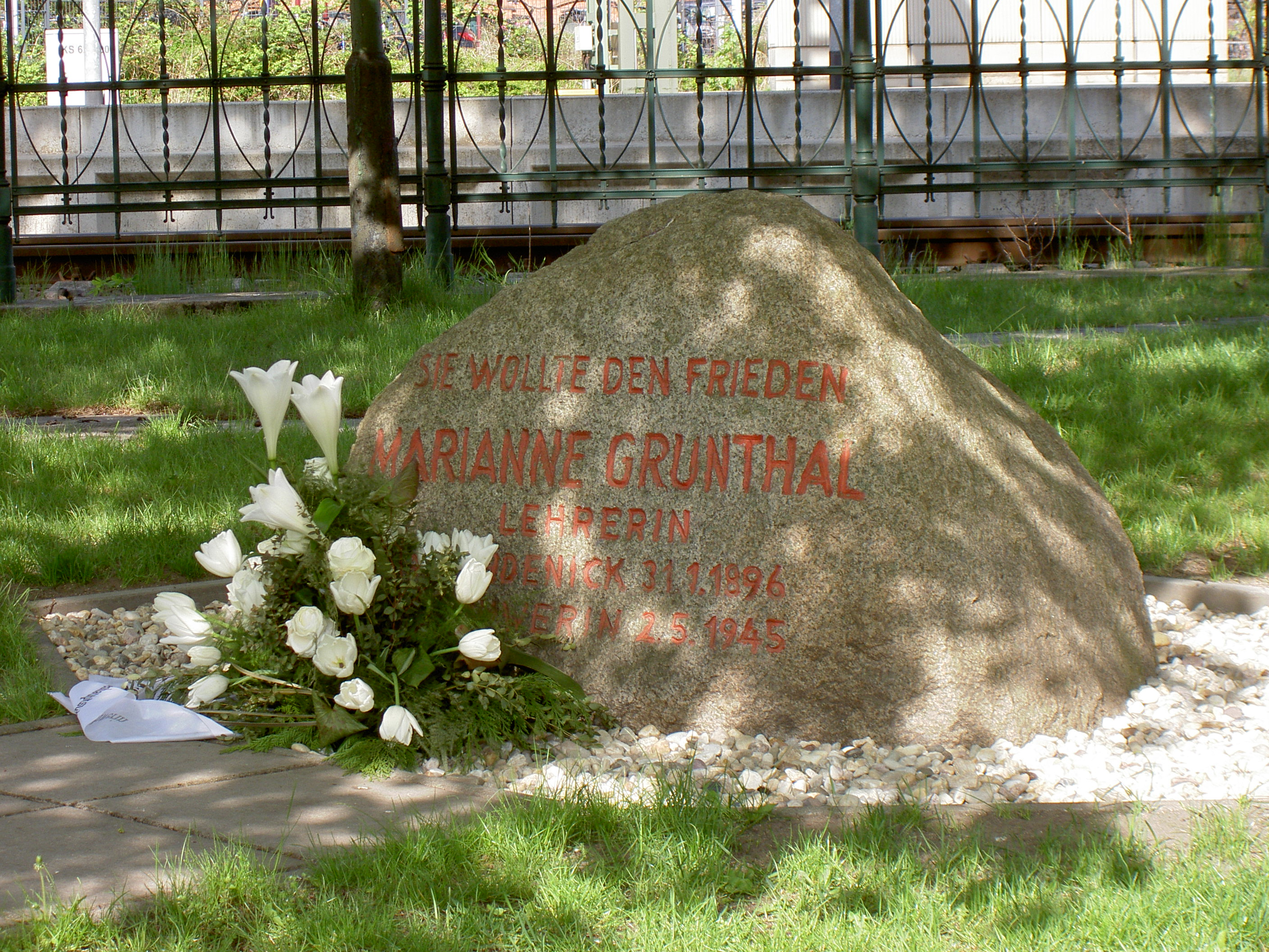 Gedenkstein